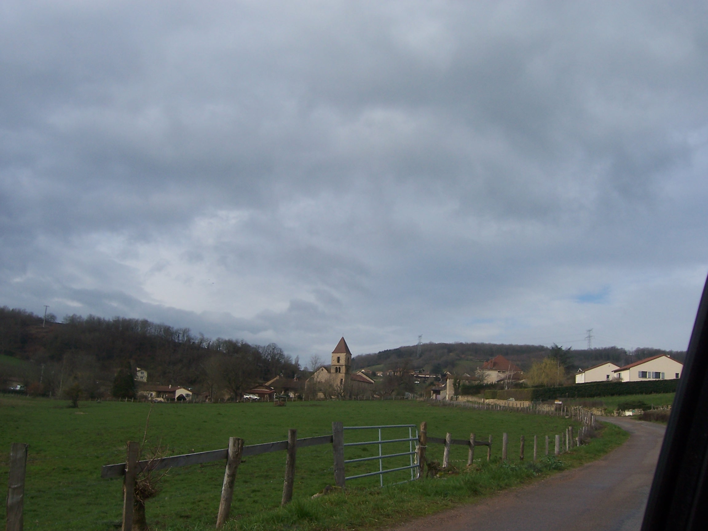 Jalogny